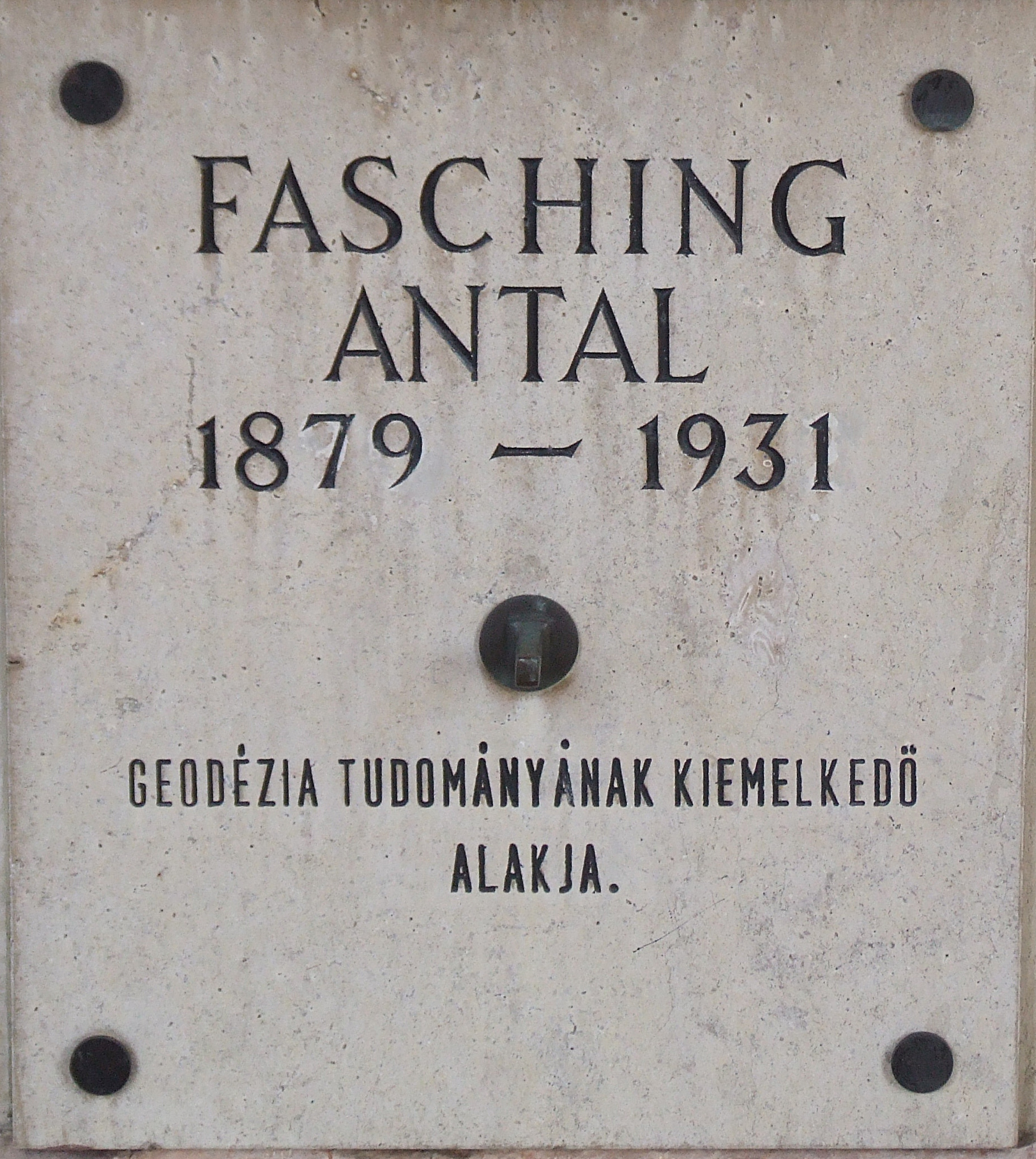 Fasching Antal mellszobor emléktáblája, Budapest, V. kerület, Kossuth tér 11.